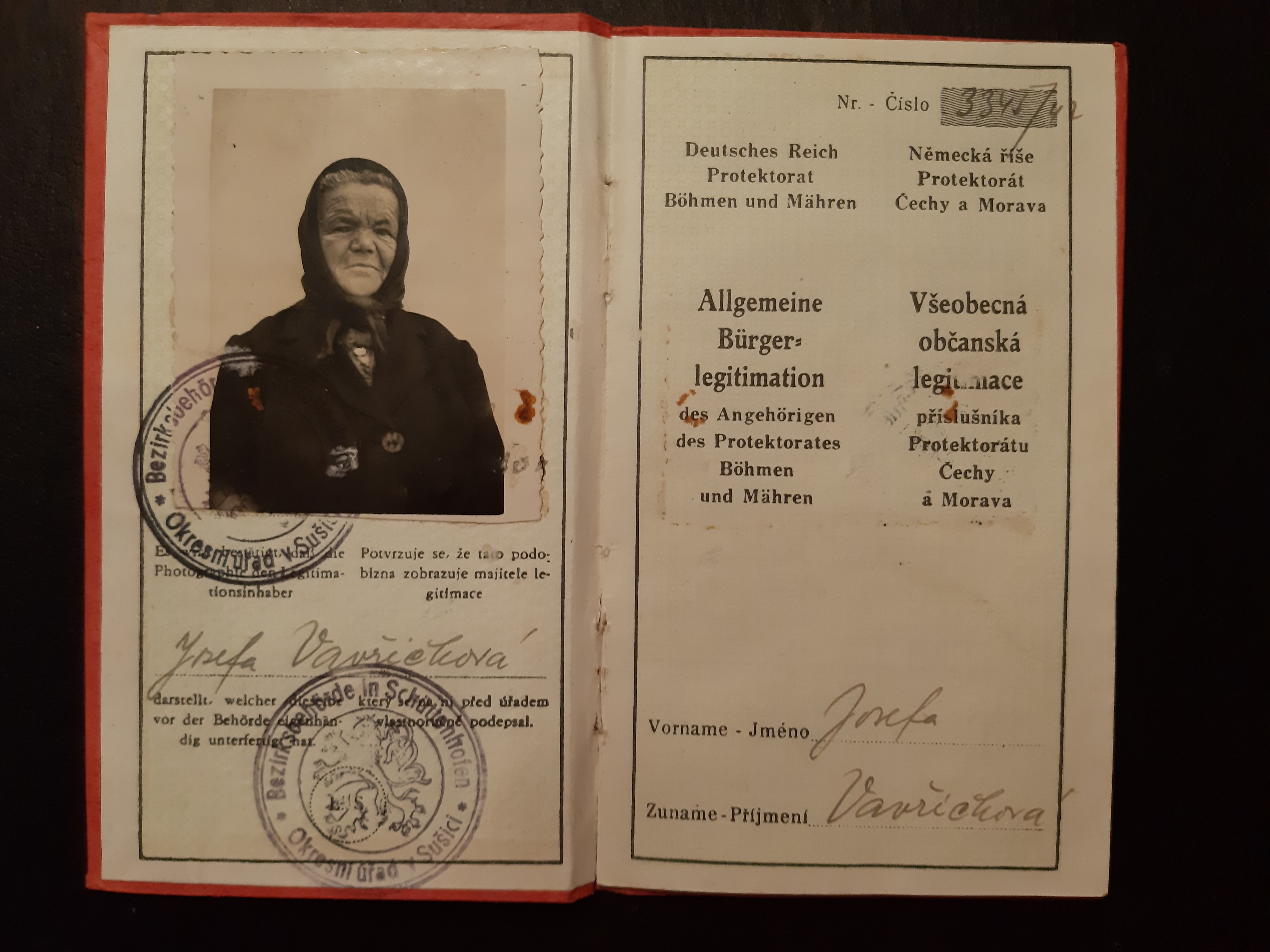 Protektorátní občanský průkaz, desky.